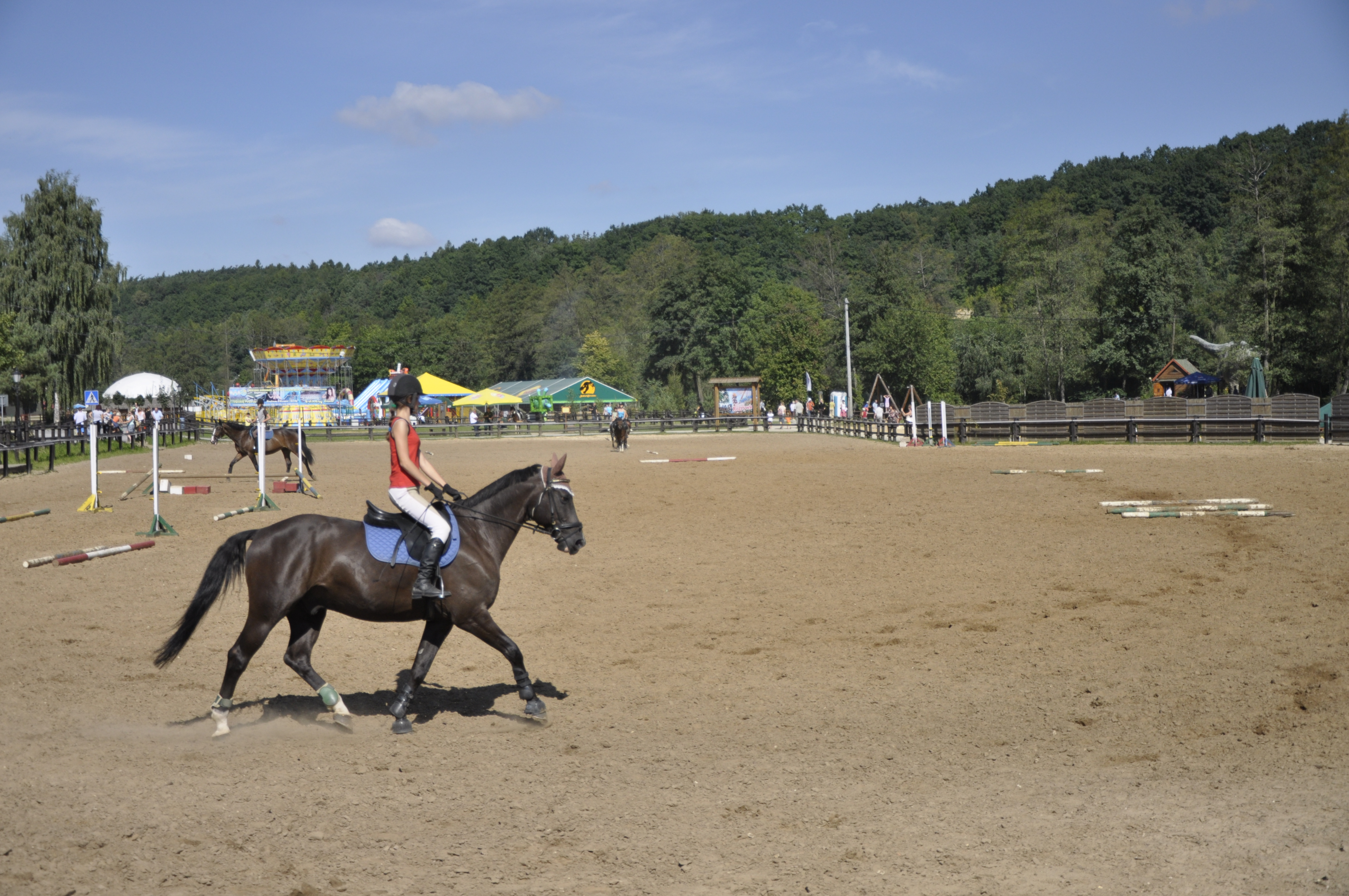 JuraPark Bałtów